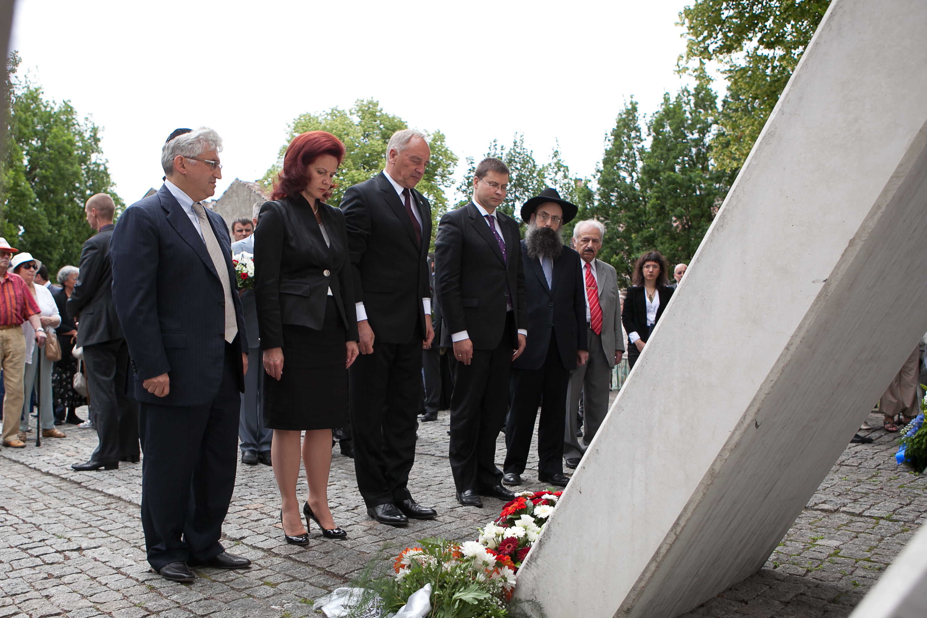 2012.gada 4.jūlijs. Saeimas priekšsēdētāja Solvita Āboltiņa piedalās Ebreju tautas genocīda upuru piemiņas dienas pasākumā. Foto: Ernests Dinka, Saeimas Kanceleja